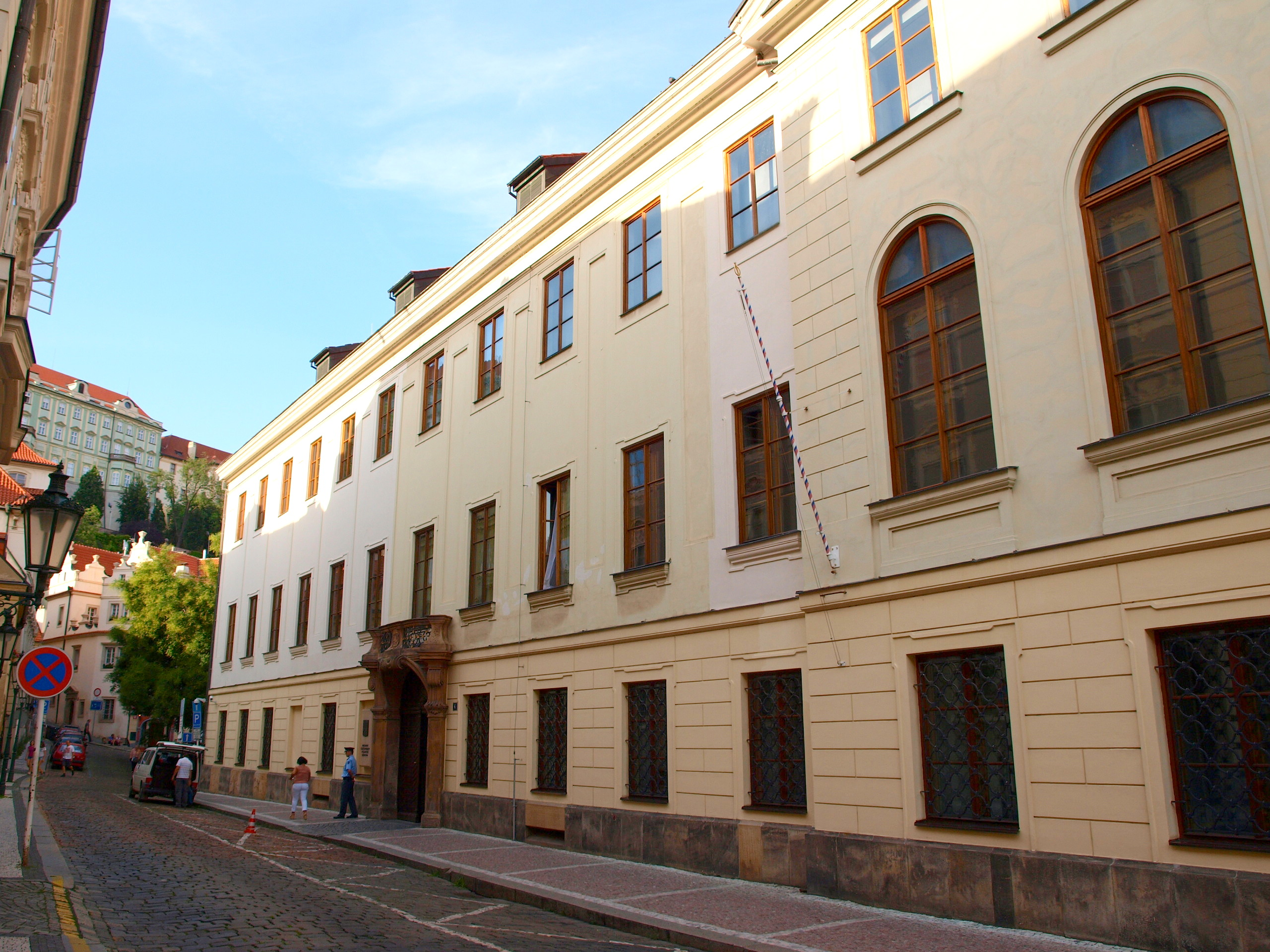 Thunovský palác, Sněmovní